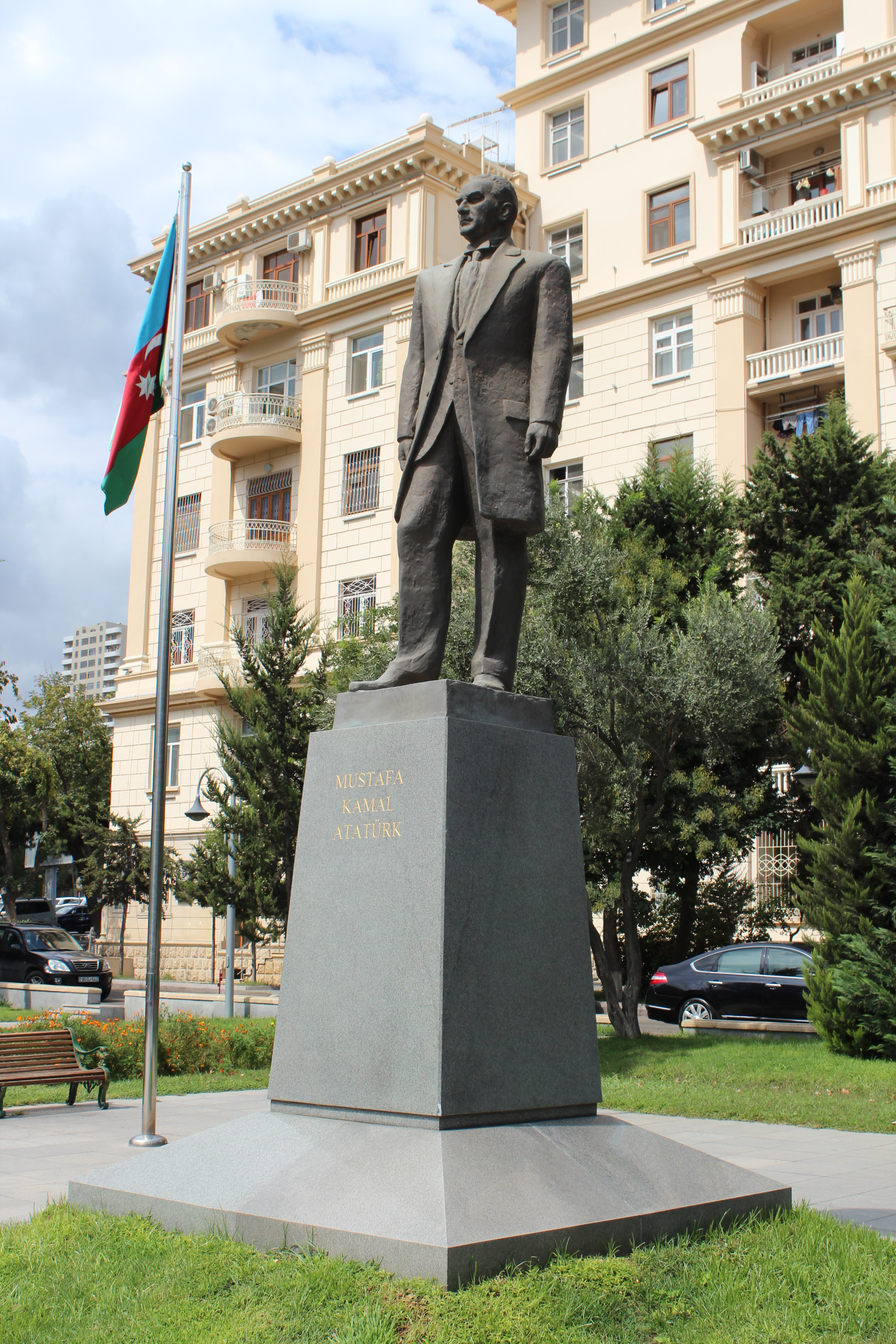 Atatürkün Bakıdakı heykəli